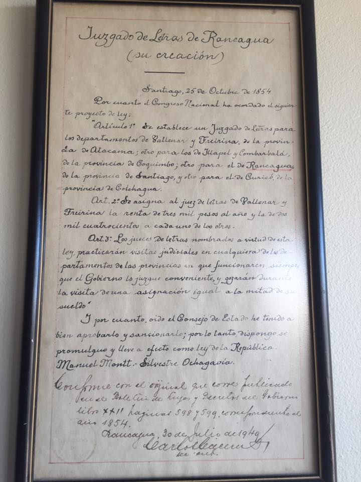 Réplica de la Ley de 25 de octubre de 1854 que ordenó la creación de un Juzgado de Letras para el Departamento de Rancagua, en la Biblioteca de la Corte de Apelaciones de dicha ciudad.